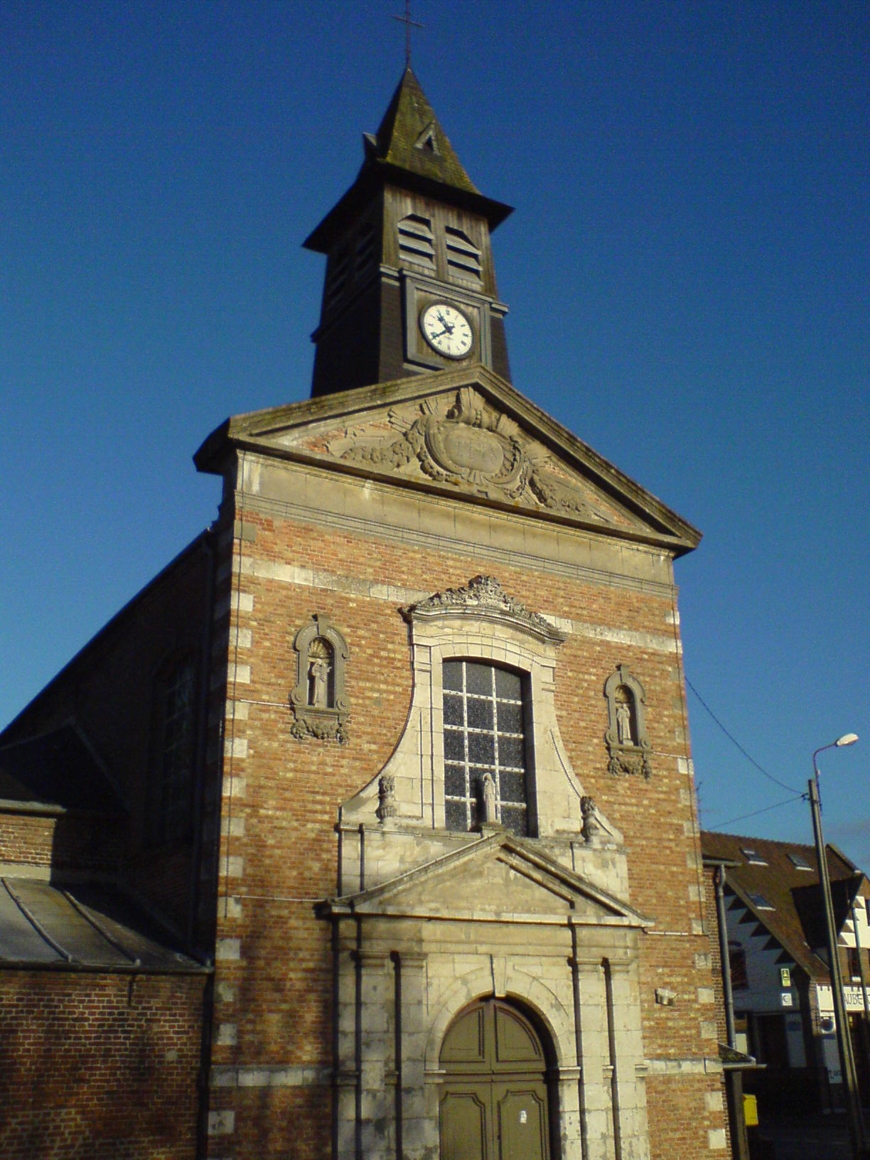 Eglise Saint-Thomas-de-Cantorbery de Morbecque (la Motte-aux-Bois)